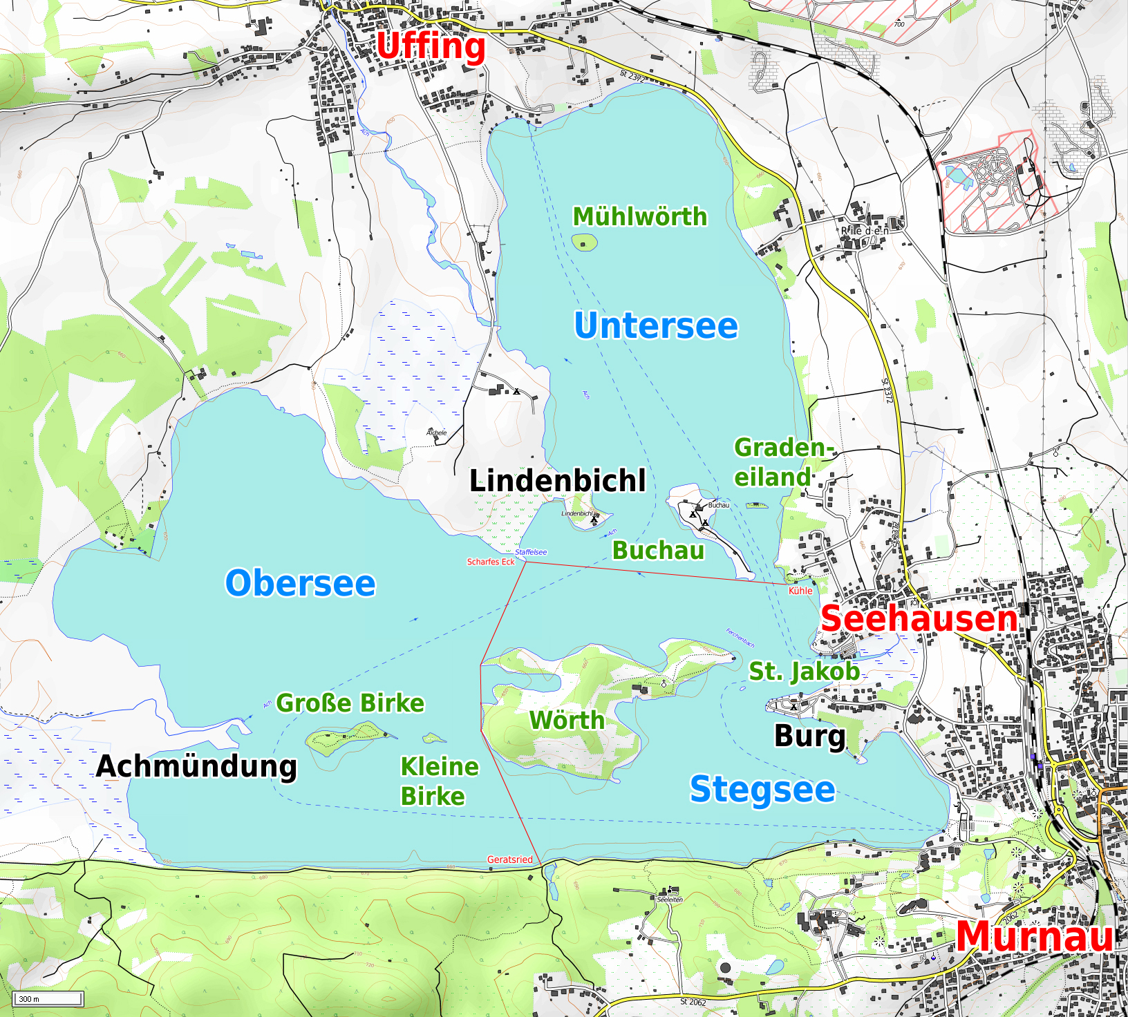 Karte des Staffelsees